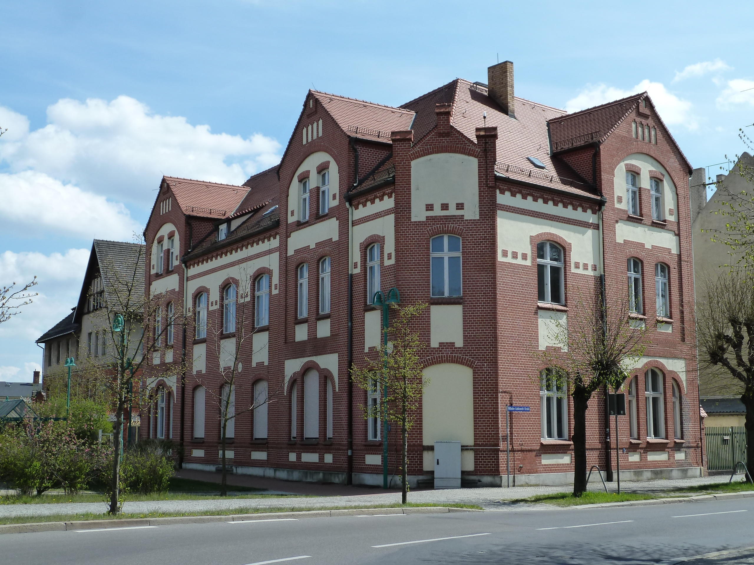 Bahnhof Finsterwalde, Verwaltungsgebäude/Bahnhofhotel gegenüber Bahnhof